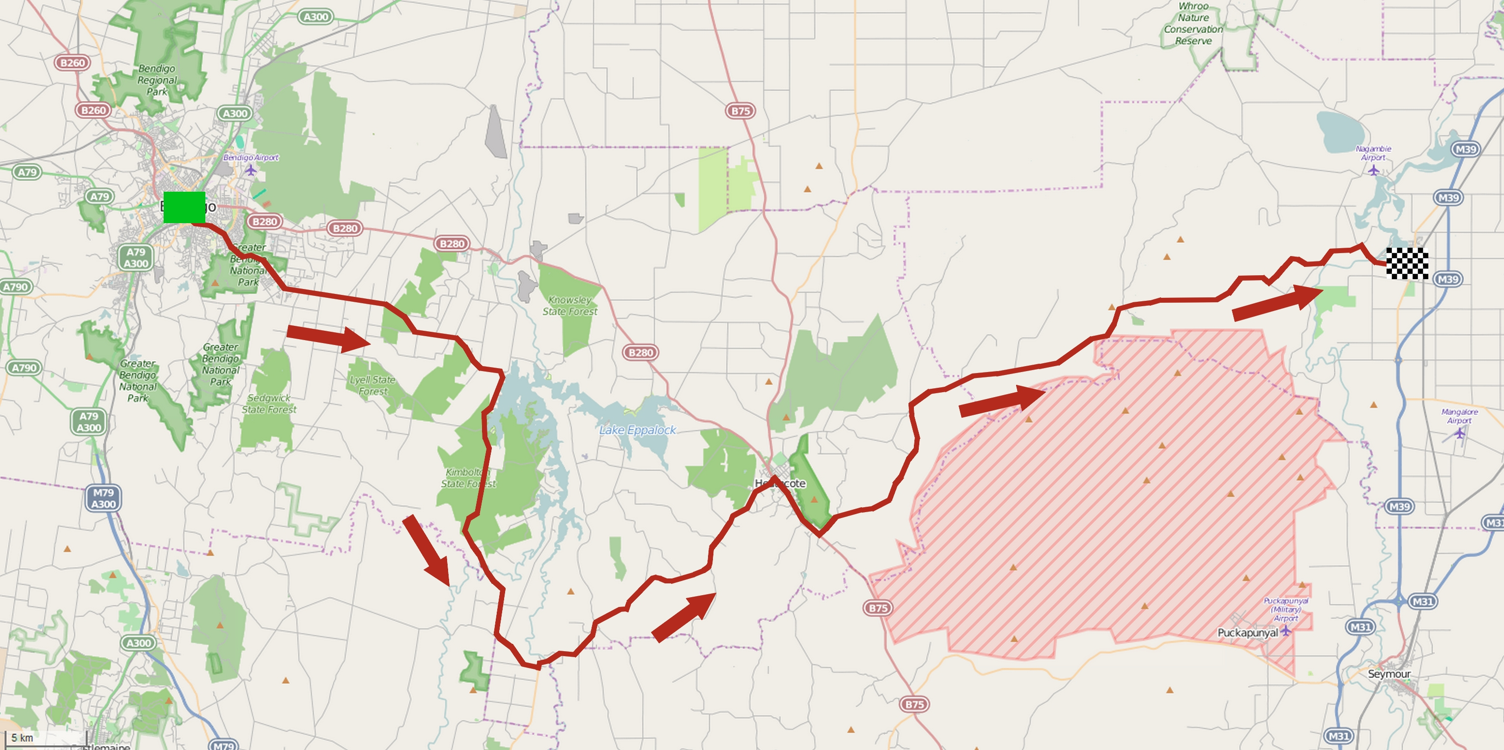 Parcours de la deuxième étape du Herald Sun Tour 2015. This map may be incomplete, and may contain errors. Don't rely solely on it for navigation.